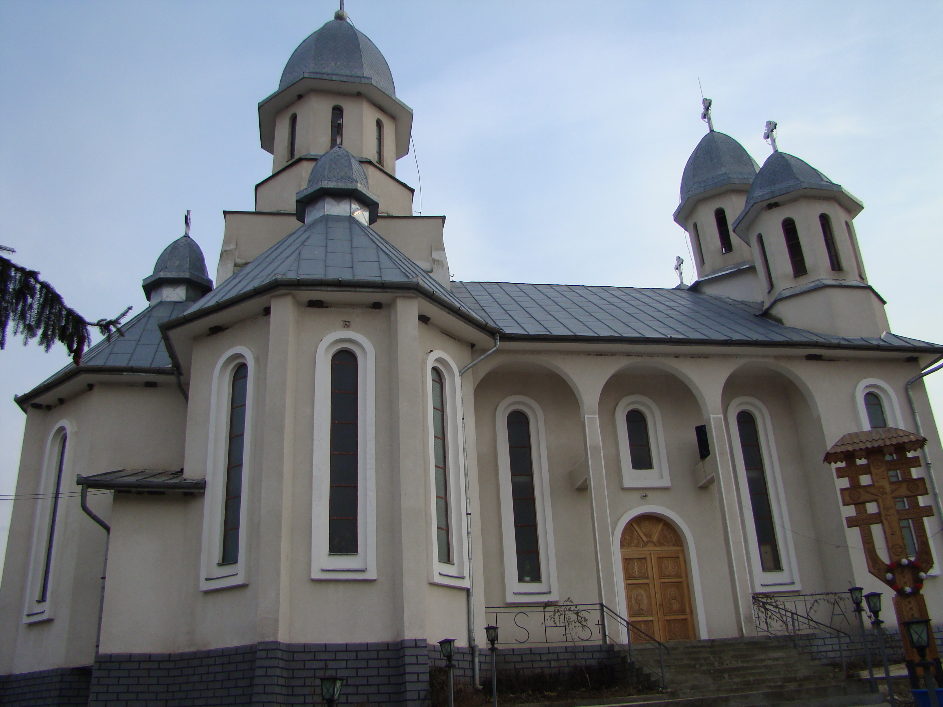 Biserica nouă din Iera, județul Cluj